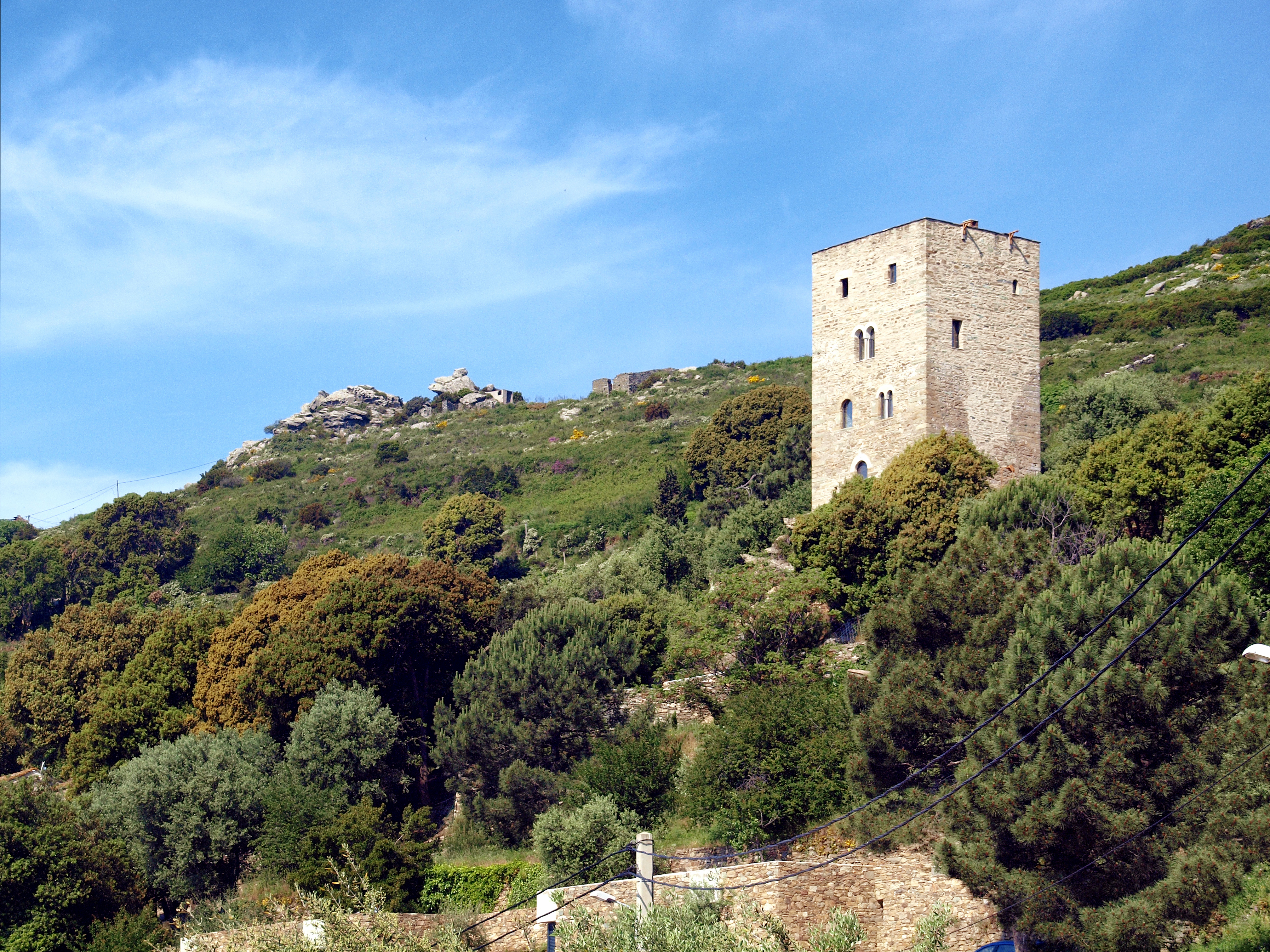 Bastia, Corse - Maison-tour de La Vetrice à Cardo